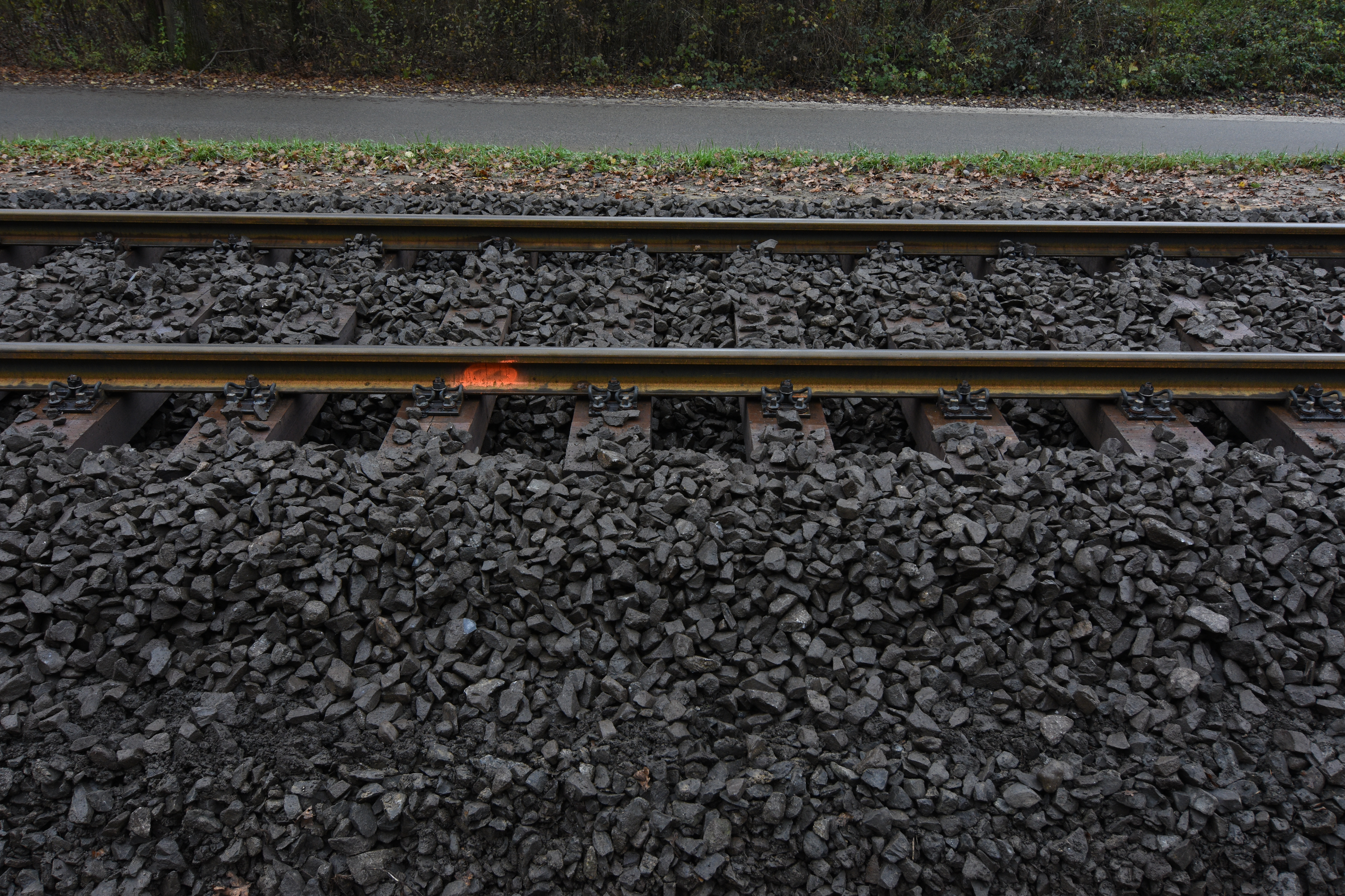 ÖBB Swietelsky RM85 750 Gleisbau Rail Tracks Schienen